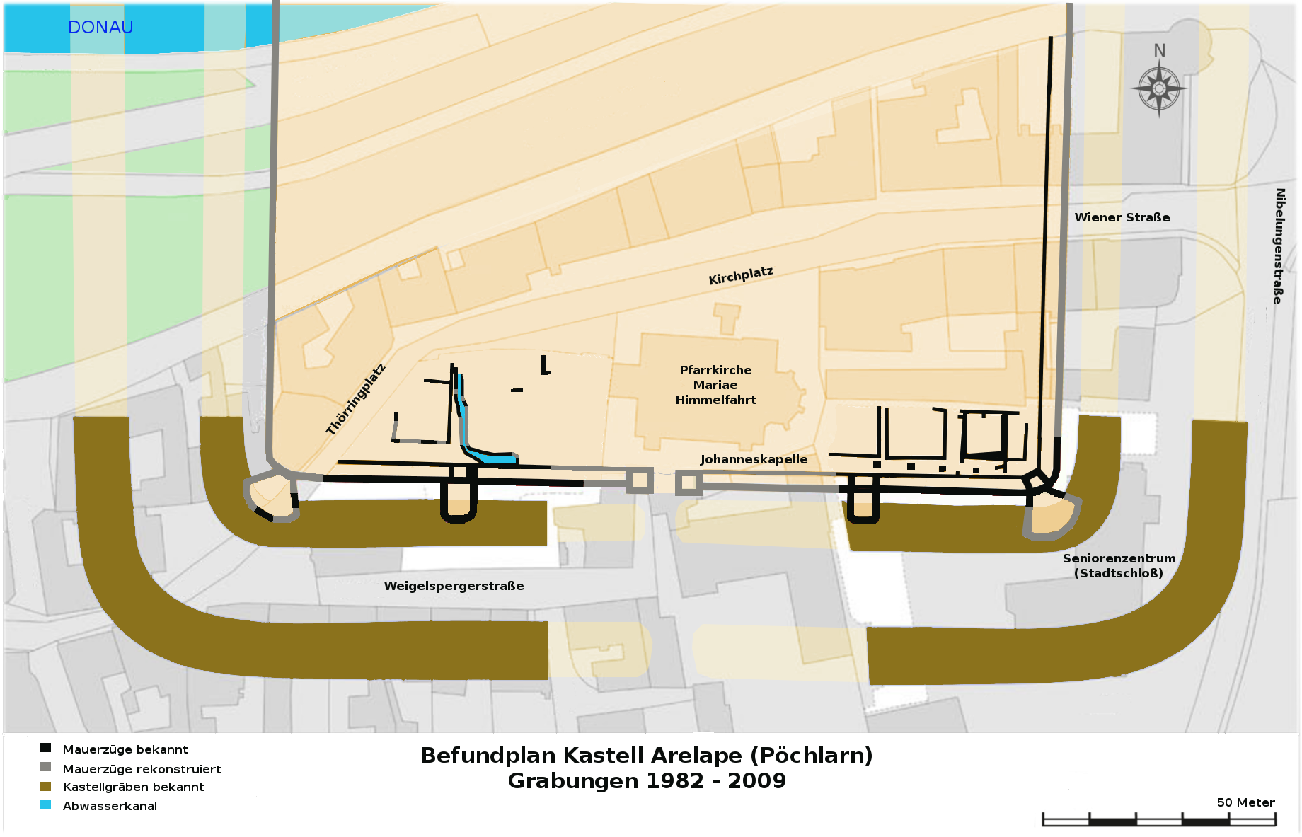 Befundplan des Kastell Pöchlarn, 1982 bis 2003, ergänzt um die Befunde bis 2009, eigenes Werk +